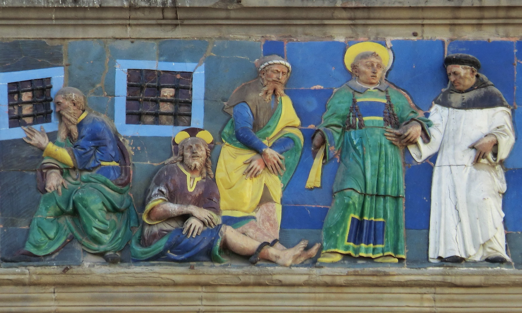 Ospedale del Ceppo, Pistoia, Italy